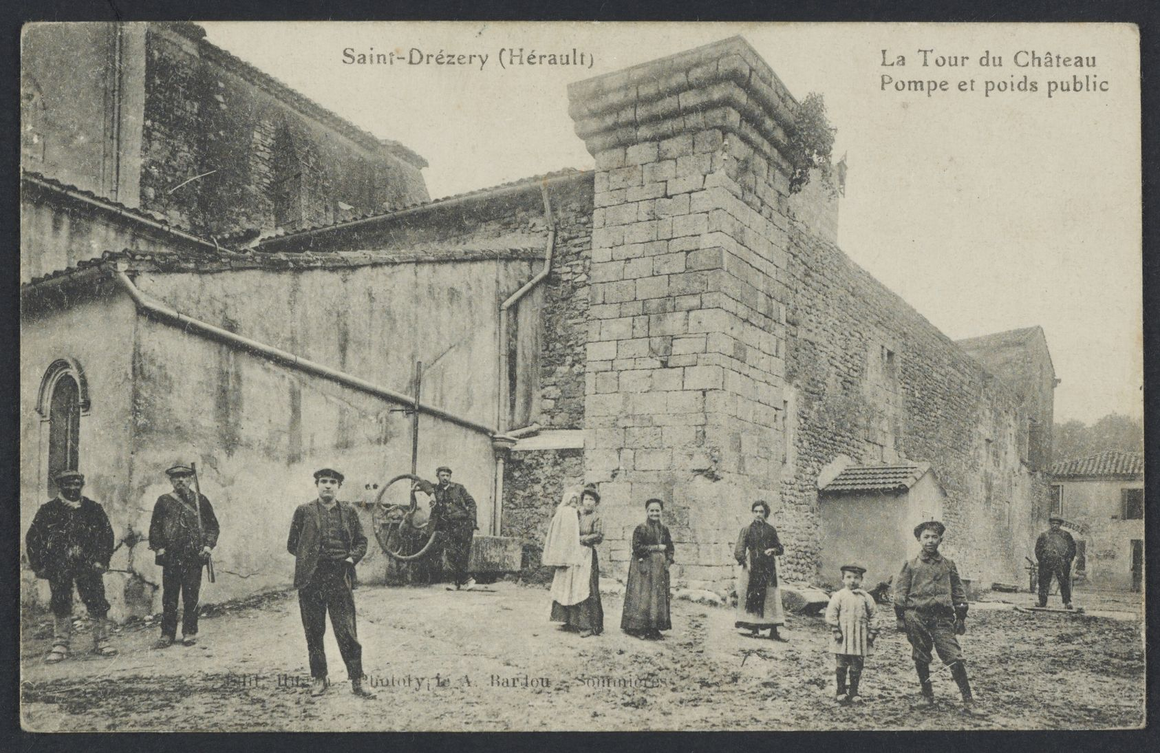 Saint-Drézery. - La tour du château, pompe et poids public : carte postale.